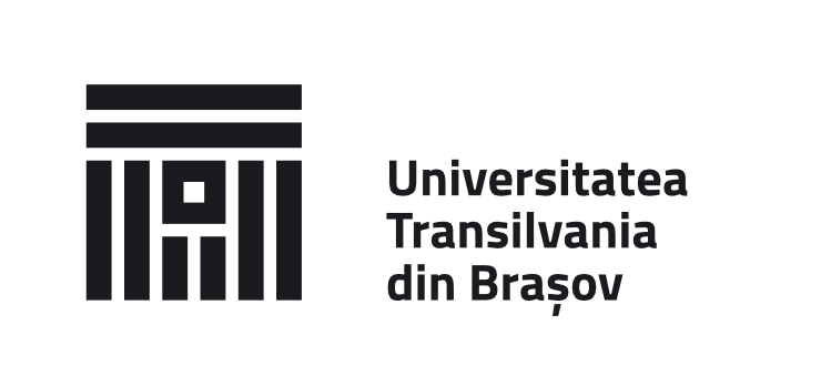 sigla UTBV